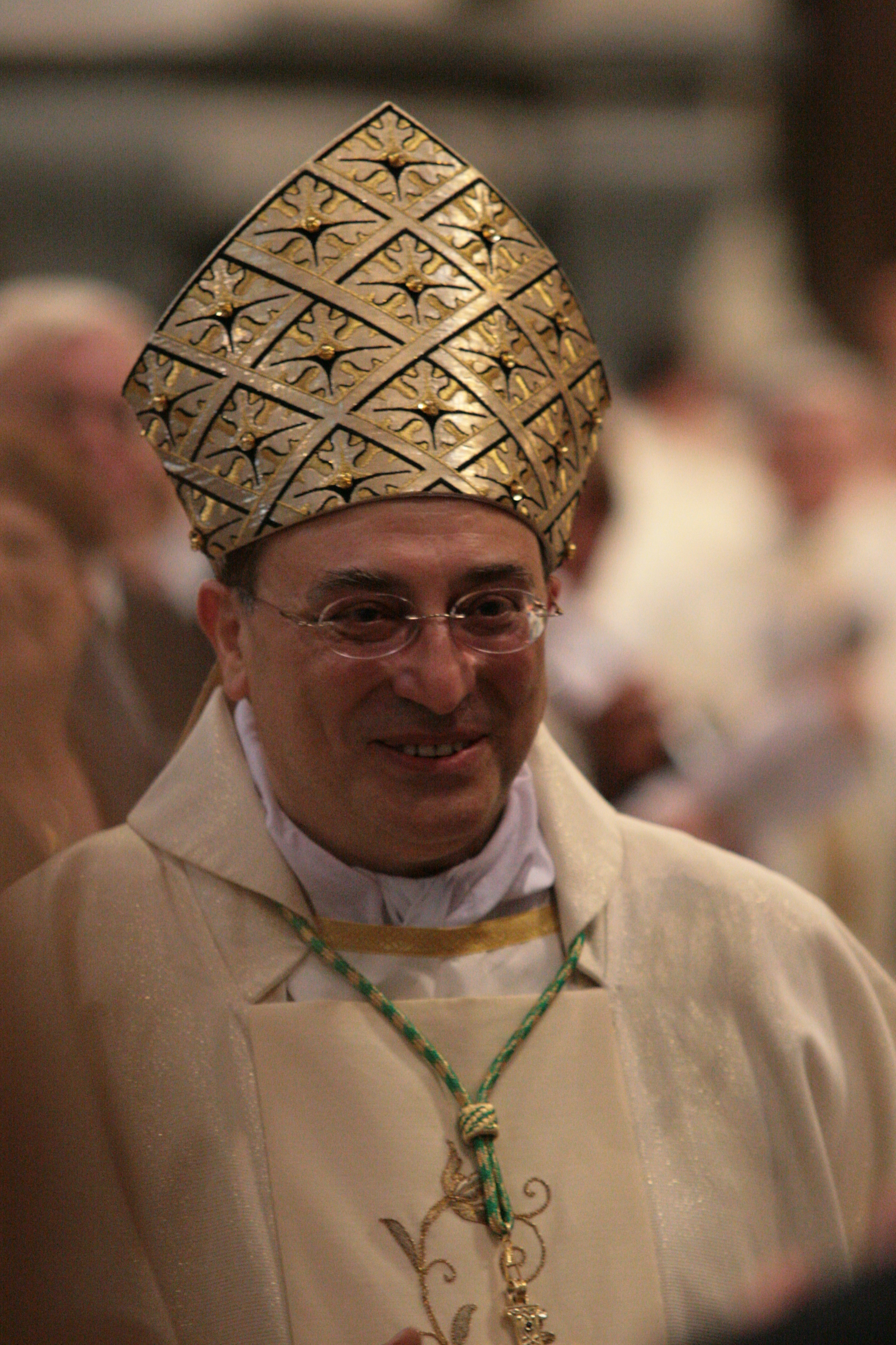 Le prélat Giuseppe Marciante, le jour de sa consécration épiscopale, comme évêque titulaire de Thagora et évêque auxiliaire de Rome.